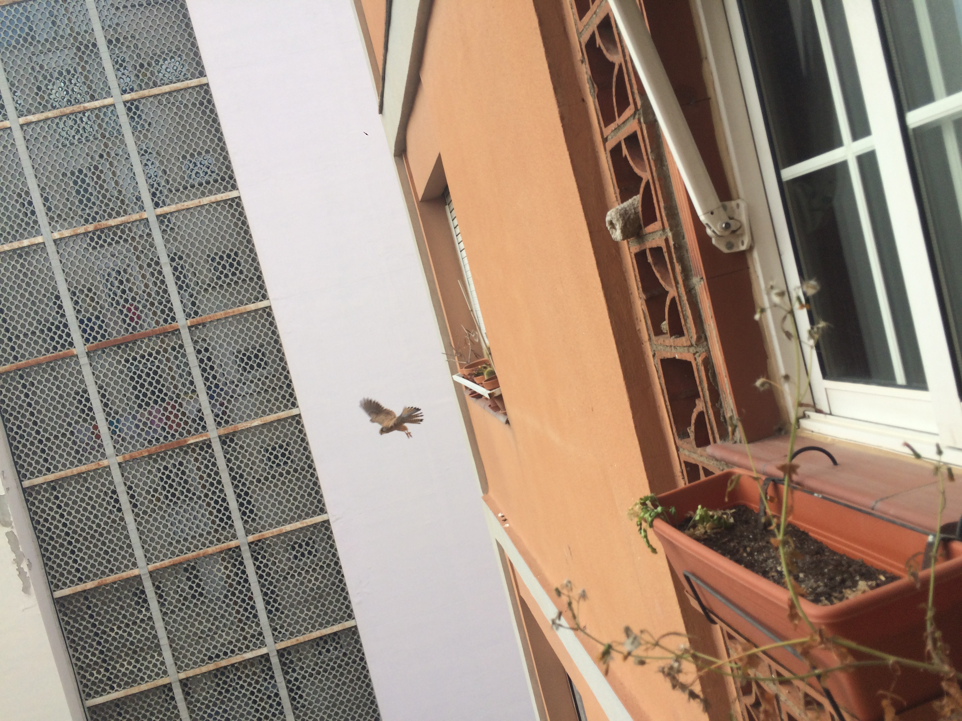 Imatge del Xoriguer en un vol deixat un niu fet a un balcó a L'hospitalet del Llobregat.